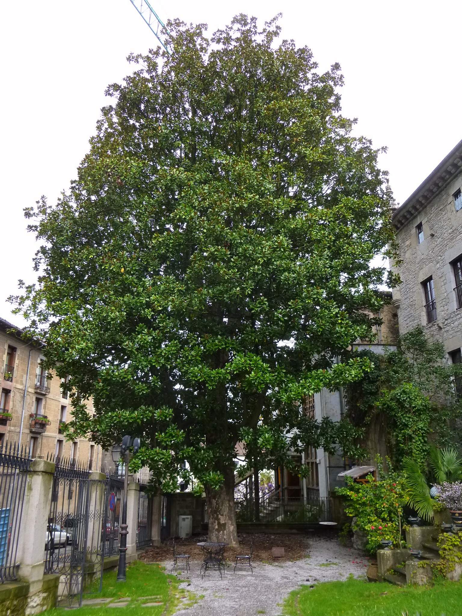 Bergara - Magnolio de Bergara